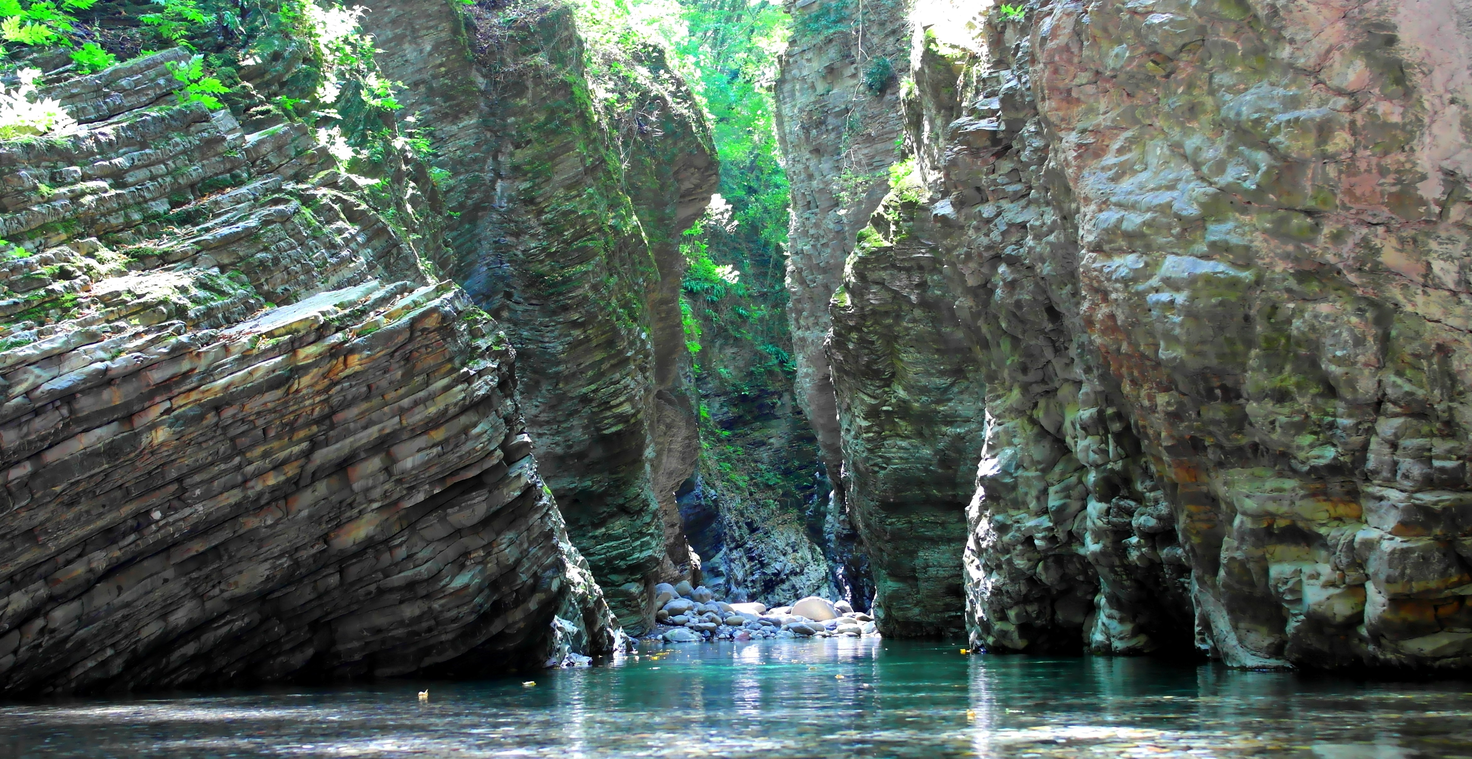 Stretti di Giaredo